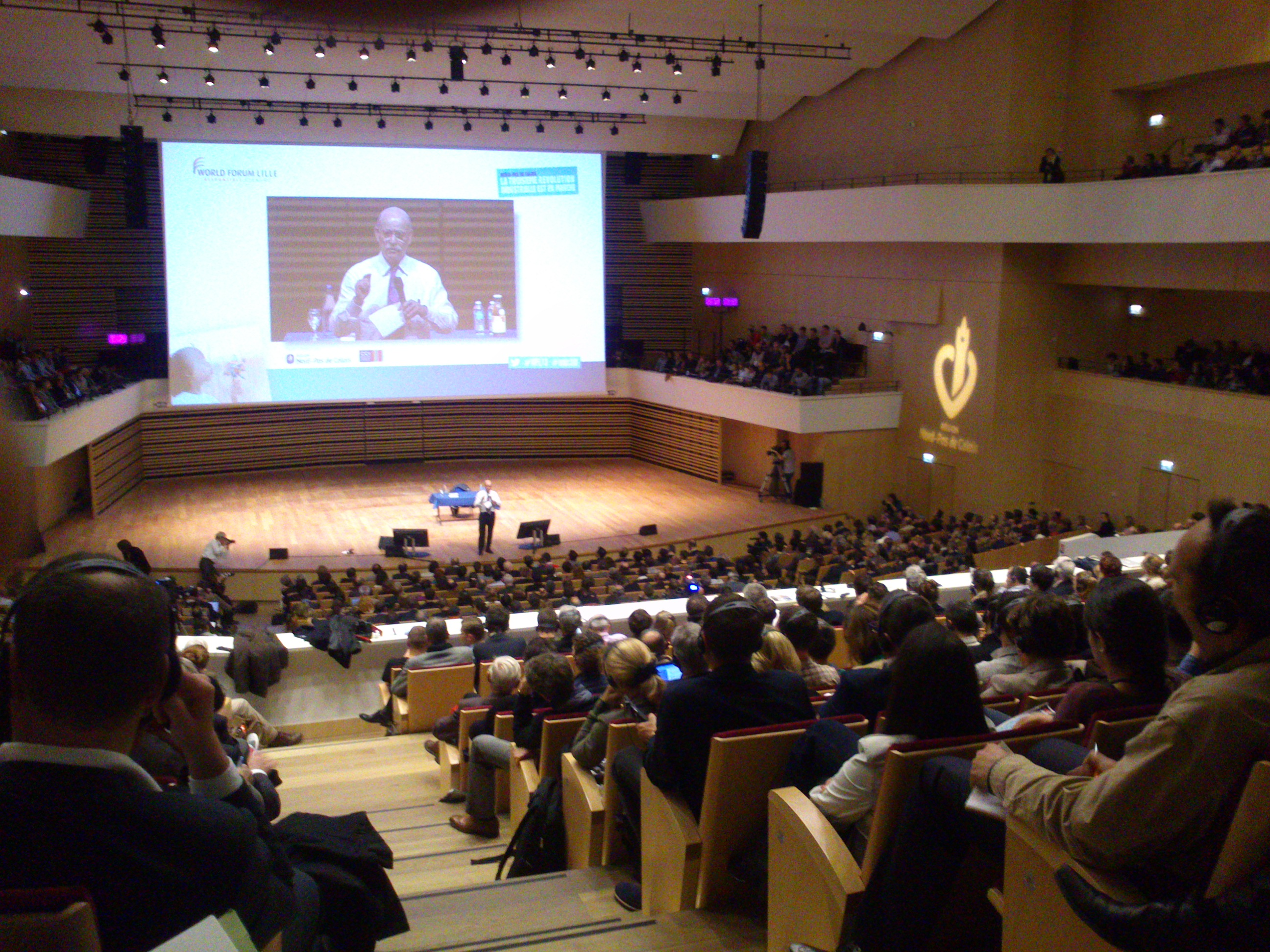 World Forum Lille 2013 Présentation du Master plan de Jeremy Rifkin